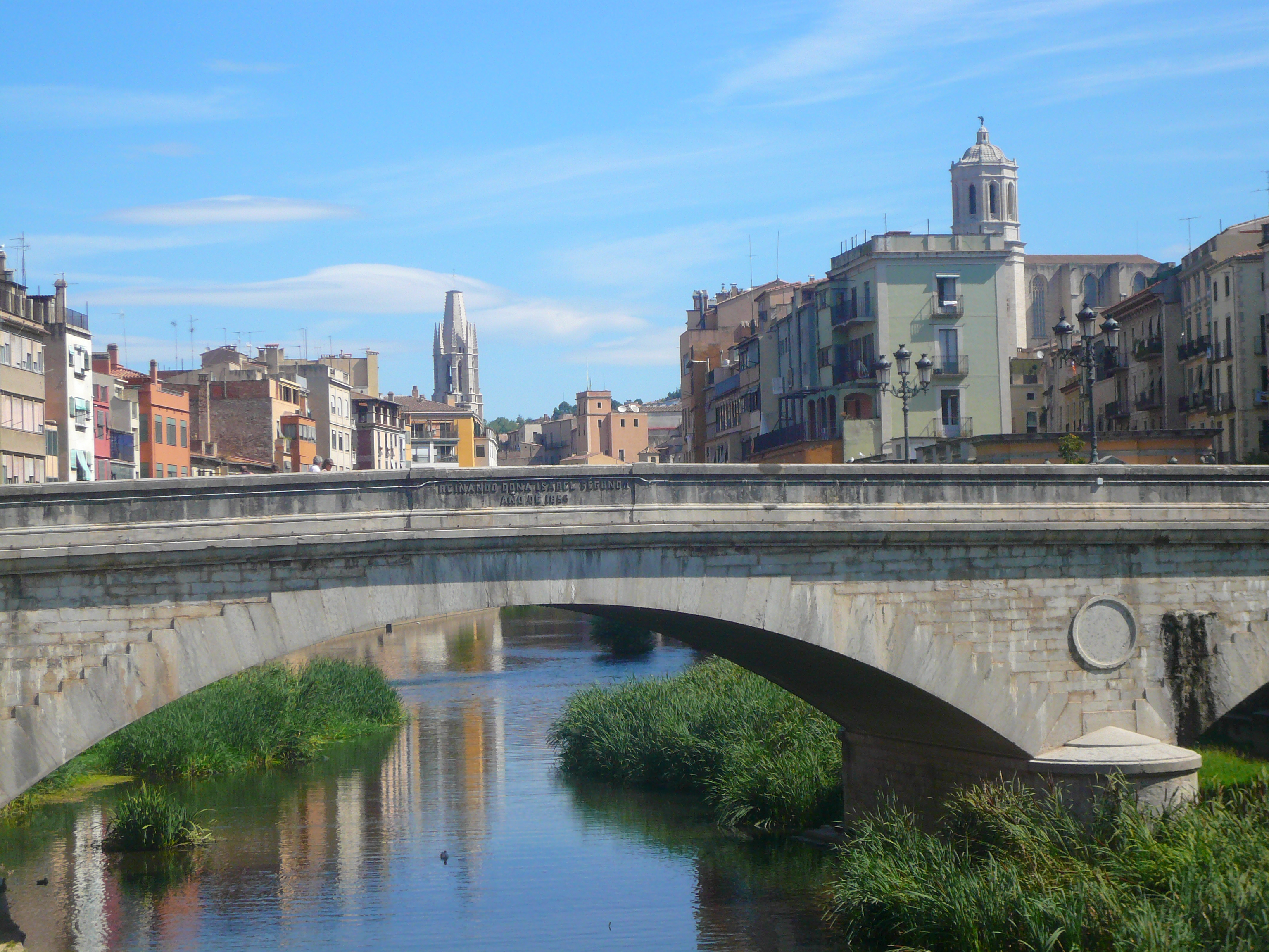 Pont de Pedra (Girona) Object location41° 58′ 57.79″ N, 2° 49′ 23.99″ E